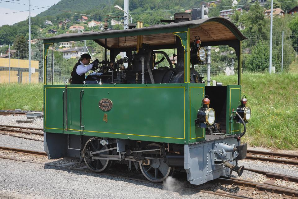 Kastendampflokomotive G 2/2 4 der ehemaligen Ferrovie Padane (FP), ursprünglich von der Bahnstrecke Ferrara-Codigoro, später Bahnstrecke Rimini-Novafeltria, bei der Museumsbahn Blonay-Chamby im Frühling 2010 in Blonay.